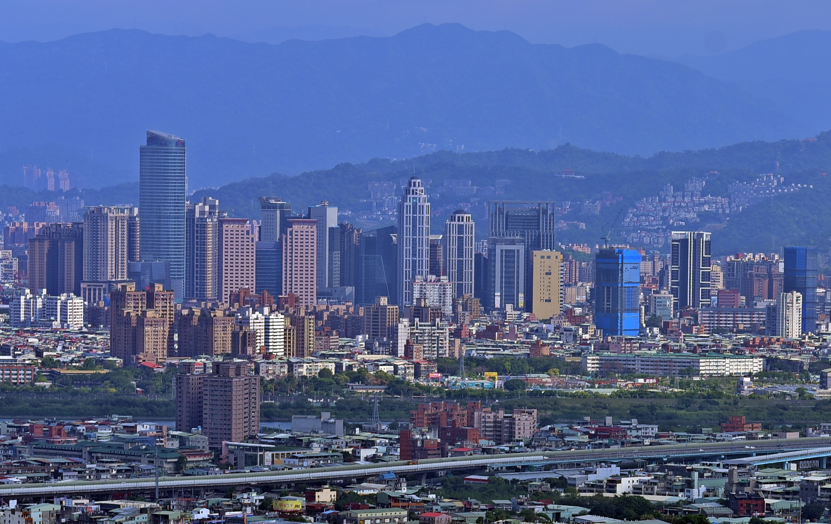 俯瞰輔大醫院